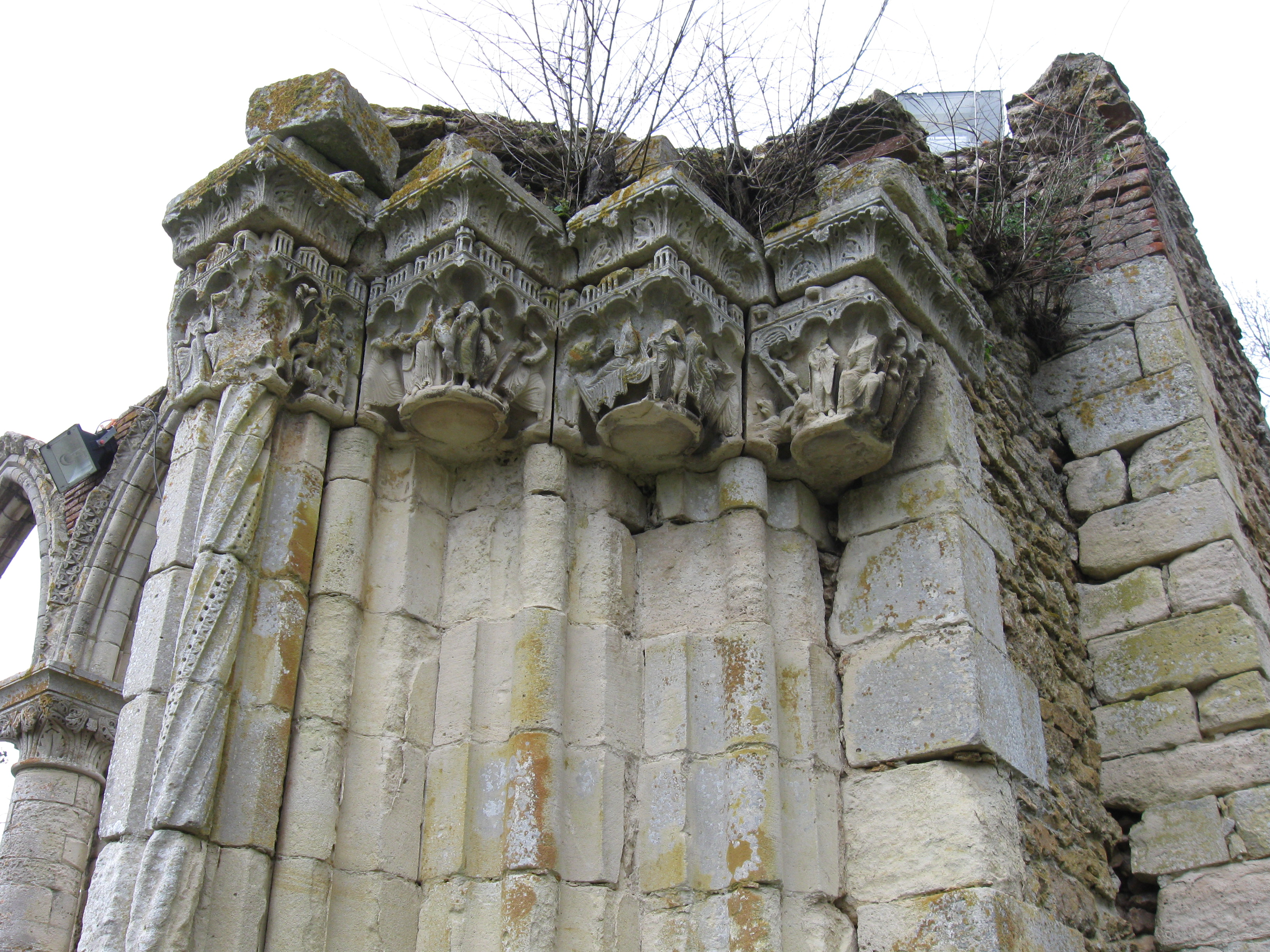 Vestiges de l'église Notre-Dame de Corbeil achetés par le comte de Goutaut-Biron en 1823 et exposés dans le parc du château de Montgermont. (Pringy, Seine-et-Marne, région Île-de-France).